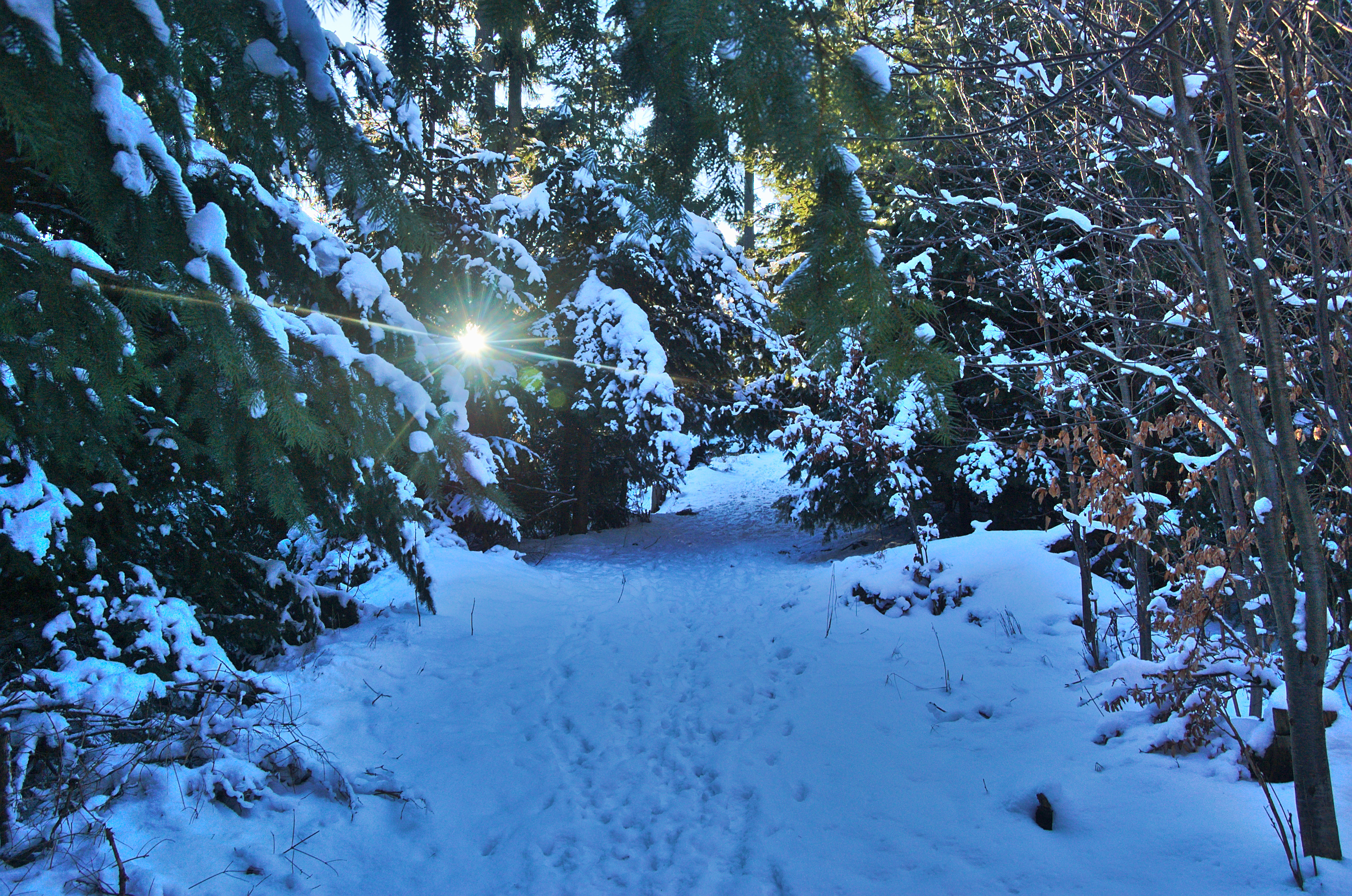 Přírodní rezervace Durana, okres Blansko